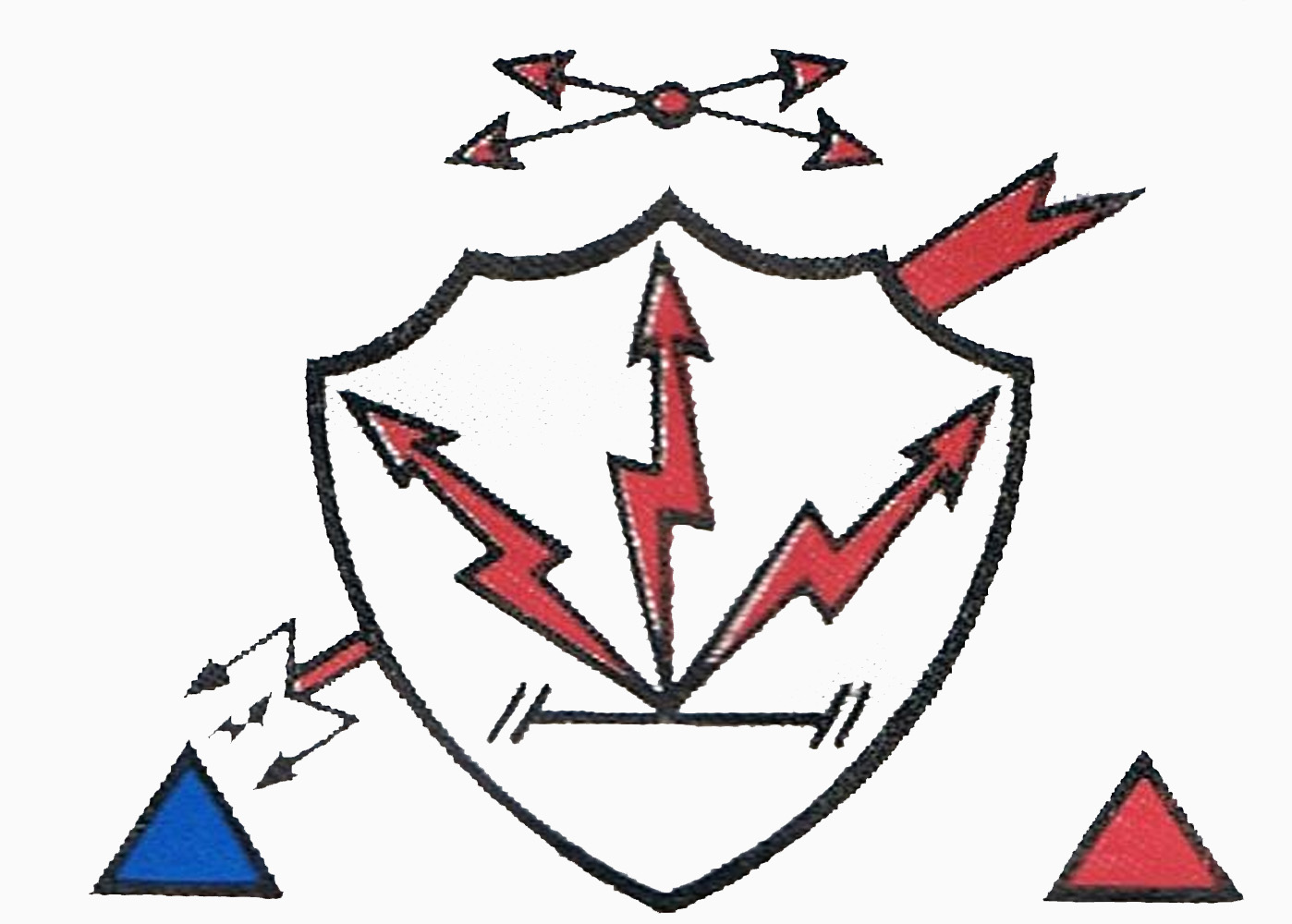 Verbandsabzeichen 5. Bataillon Funkelektronischer Kampf (BFEK-5; MB-V) in Eilenburg.